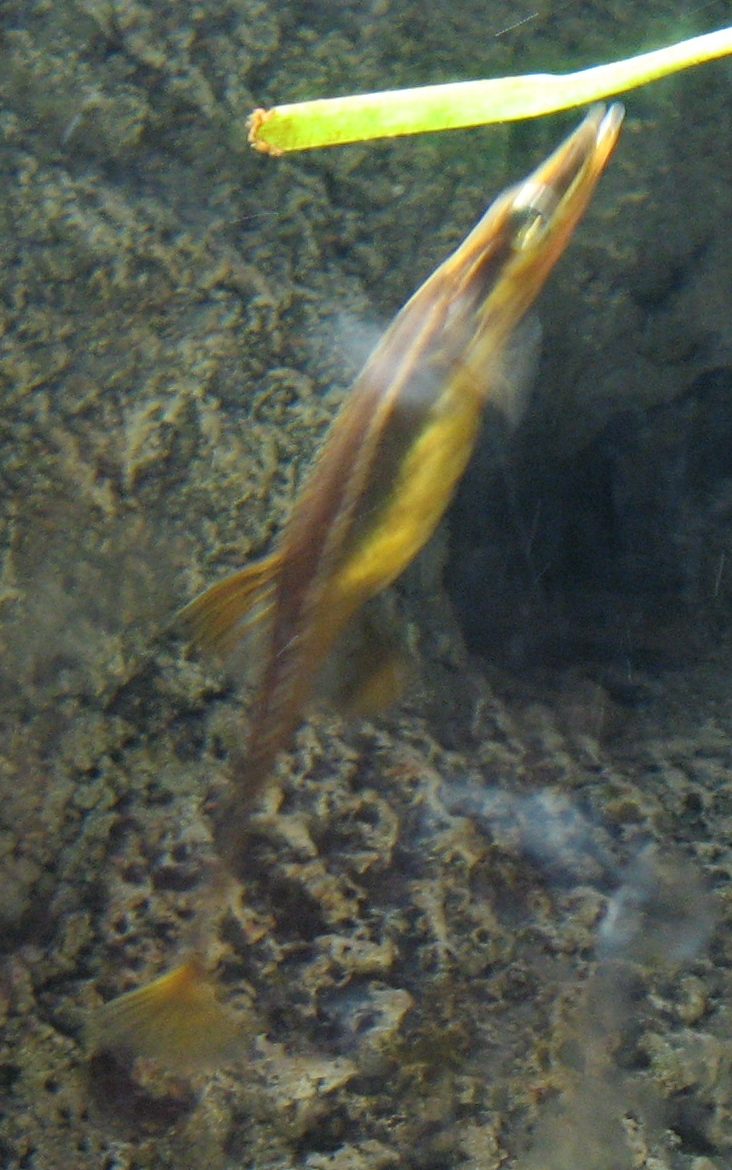 Spinachia spinachia in Aquarium Cinéaqua Map: 48° 51' 44" N 2° 17' 27" E